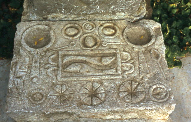 Ruines romaines de Timgad, Algérie